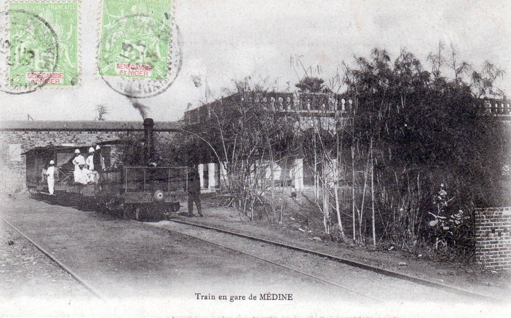 La gare de Médine avec une 030 T Weidknecht type "Kipps"